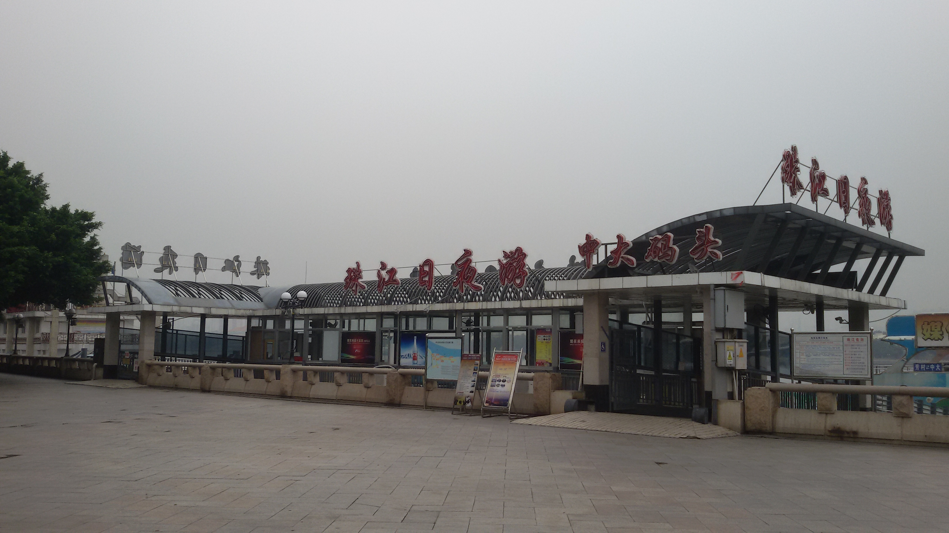 粵語: 中大碼頭